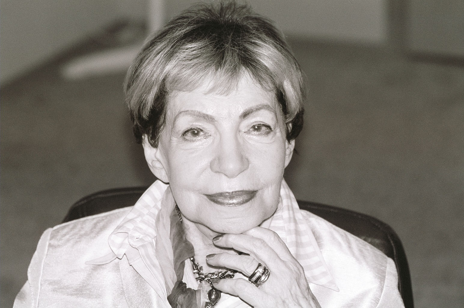 Фотография для телепрограммы. ТТЦ Останкино.